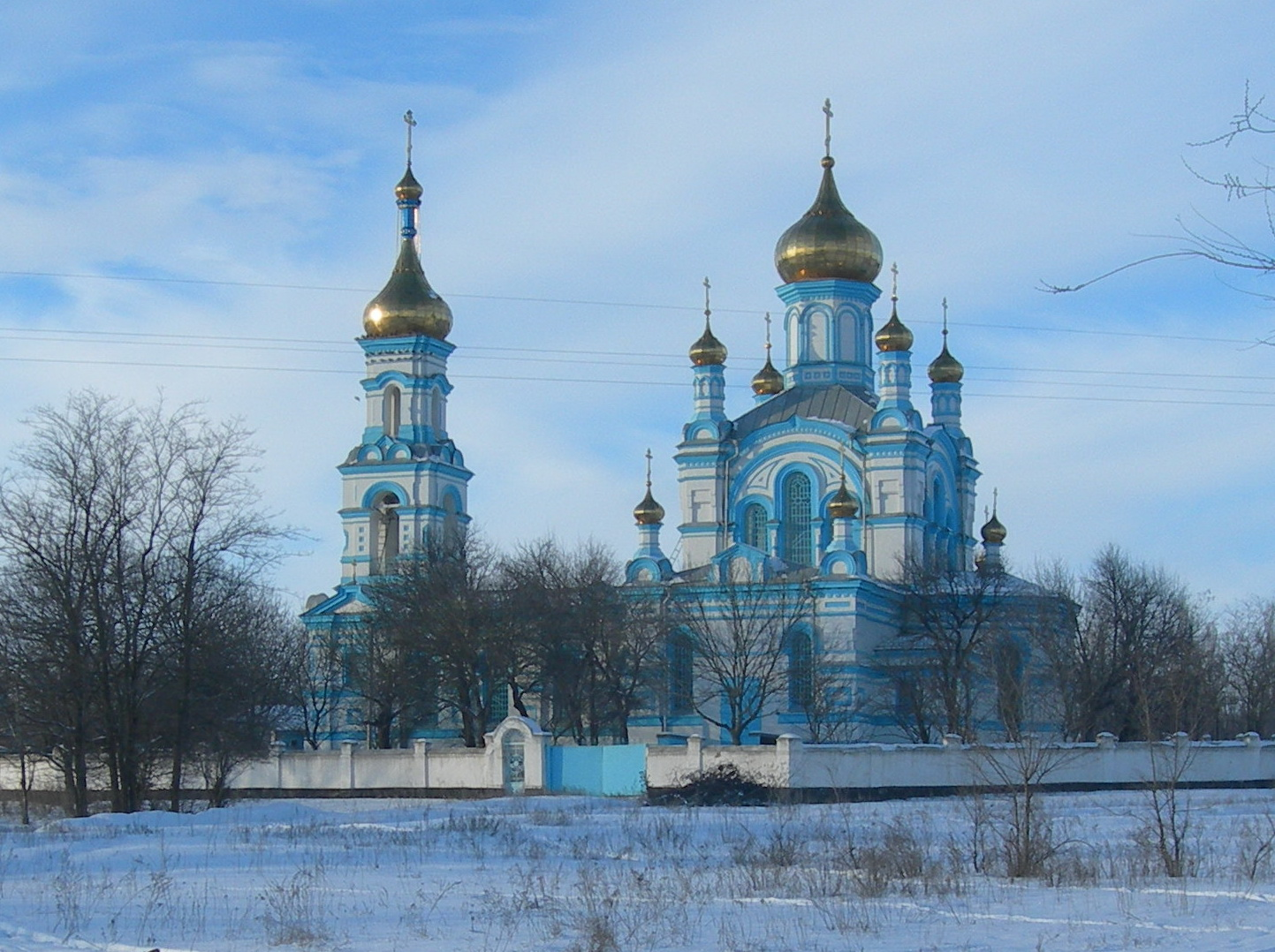 Церковь Святителя Николая в с. Кугульта.